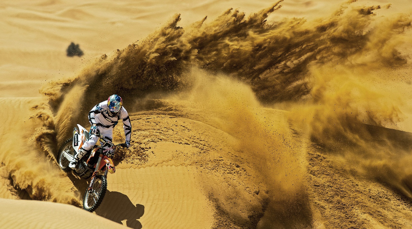 الرياضة في صحراء الرياض